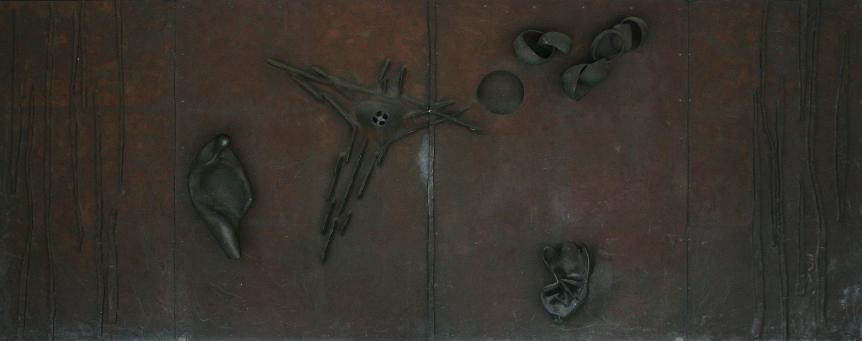 Römisch-katholische Kirche Bruder KIaus Basel, Portal von Albert Schilling